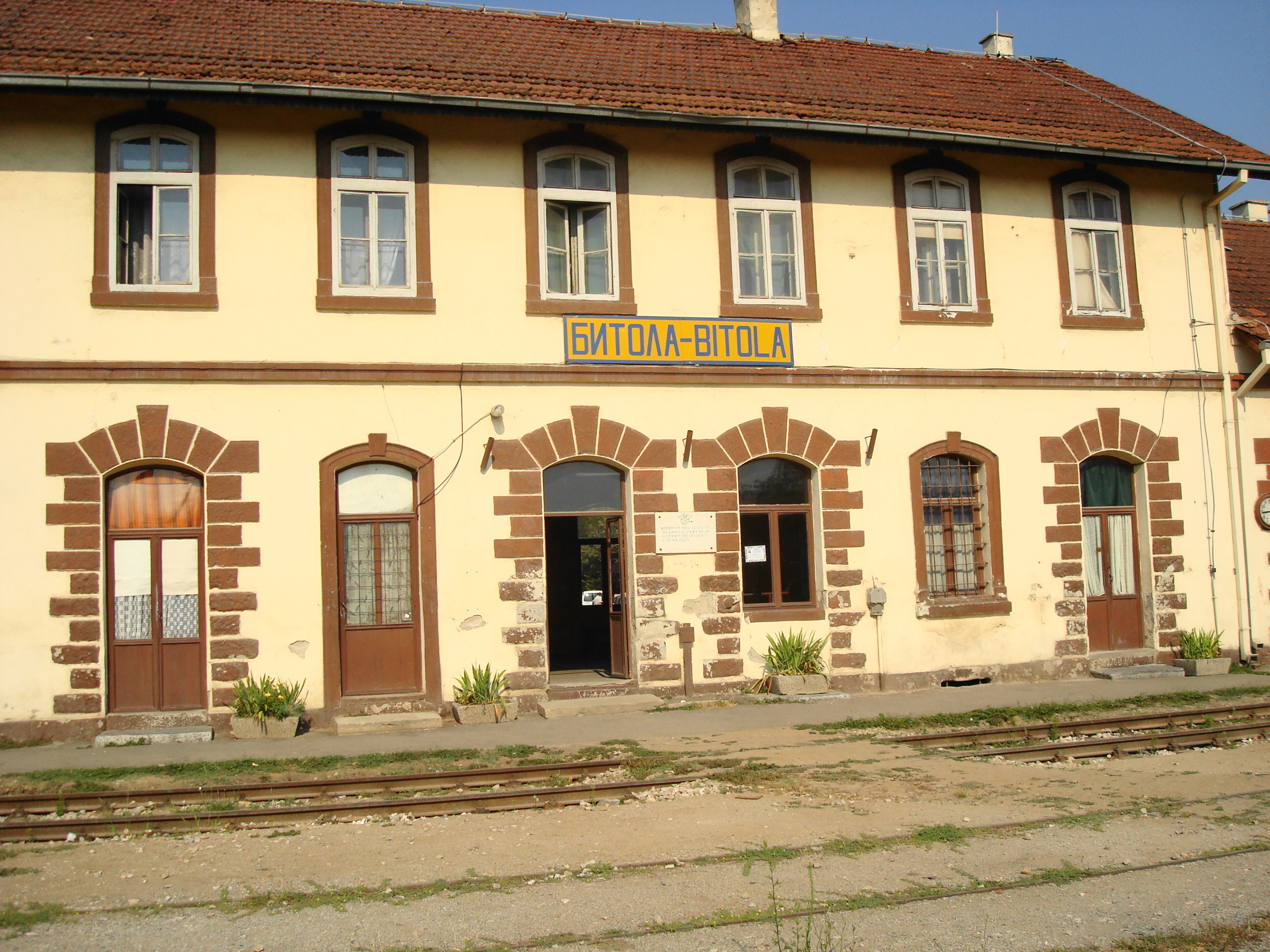 Колодвор Битољ. Слика из дигиталног фотоапарата.©